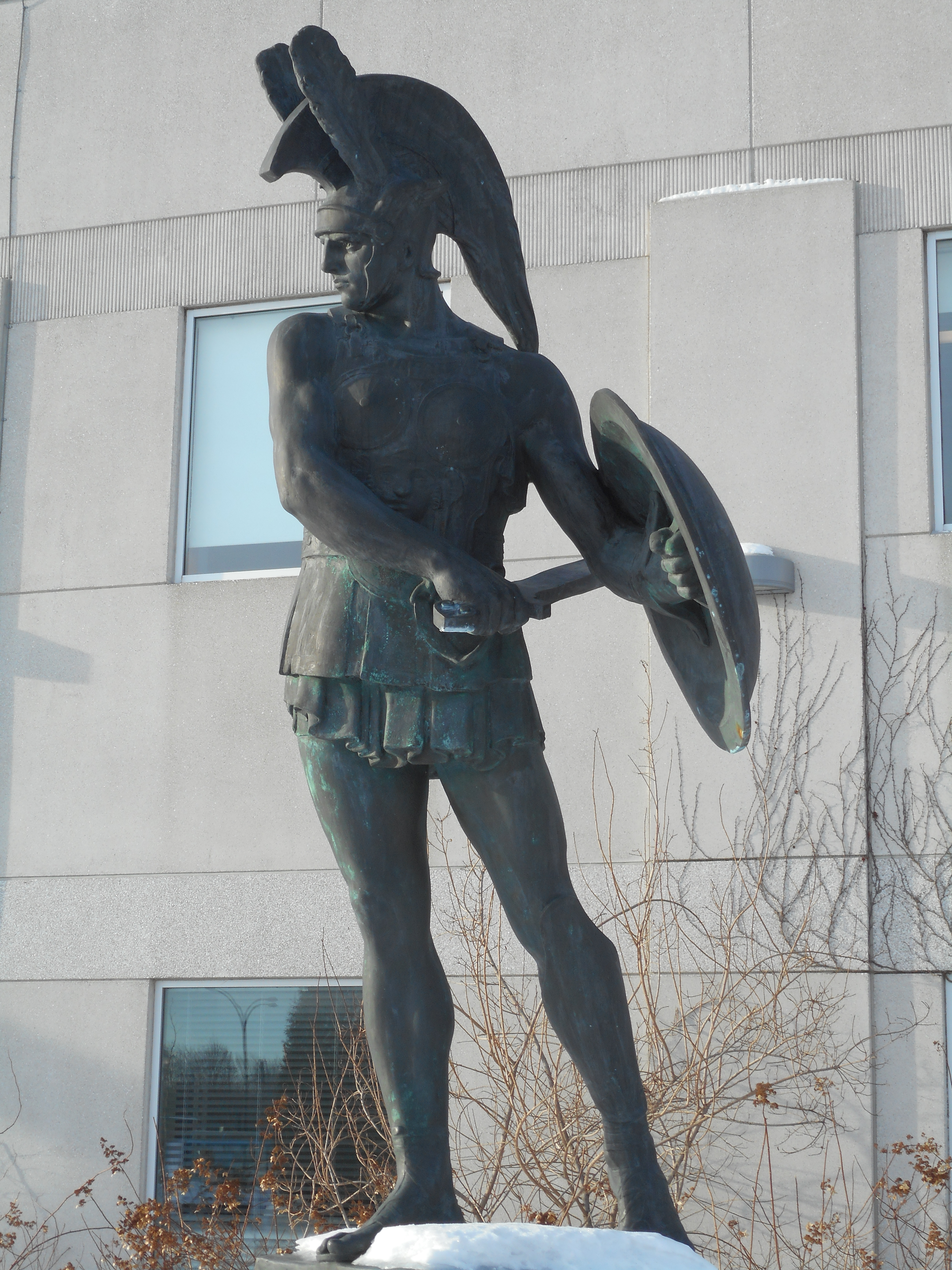 Devant le Centre Leonardo da Vinci, à Montréal, se dresse une statue en bronze d'un gladiateur. Il sagit d'une copie d'une sculpture réalisée en 1922 par Giuseppe Guastalla (1867-1952) pour un monument aux morts de la guerre installé à Pietrabbondante, une commune de la région de Molise en Italie. Elle représente un guerrier samnite. Sur la plaque est gravé : « Le guerrier samnite, symbole d'union des molisans dans le monde, emblème de fraternité entre les peuples. »